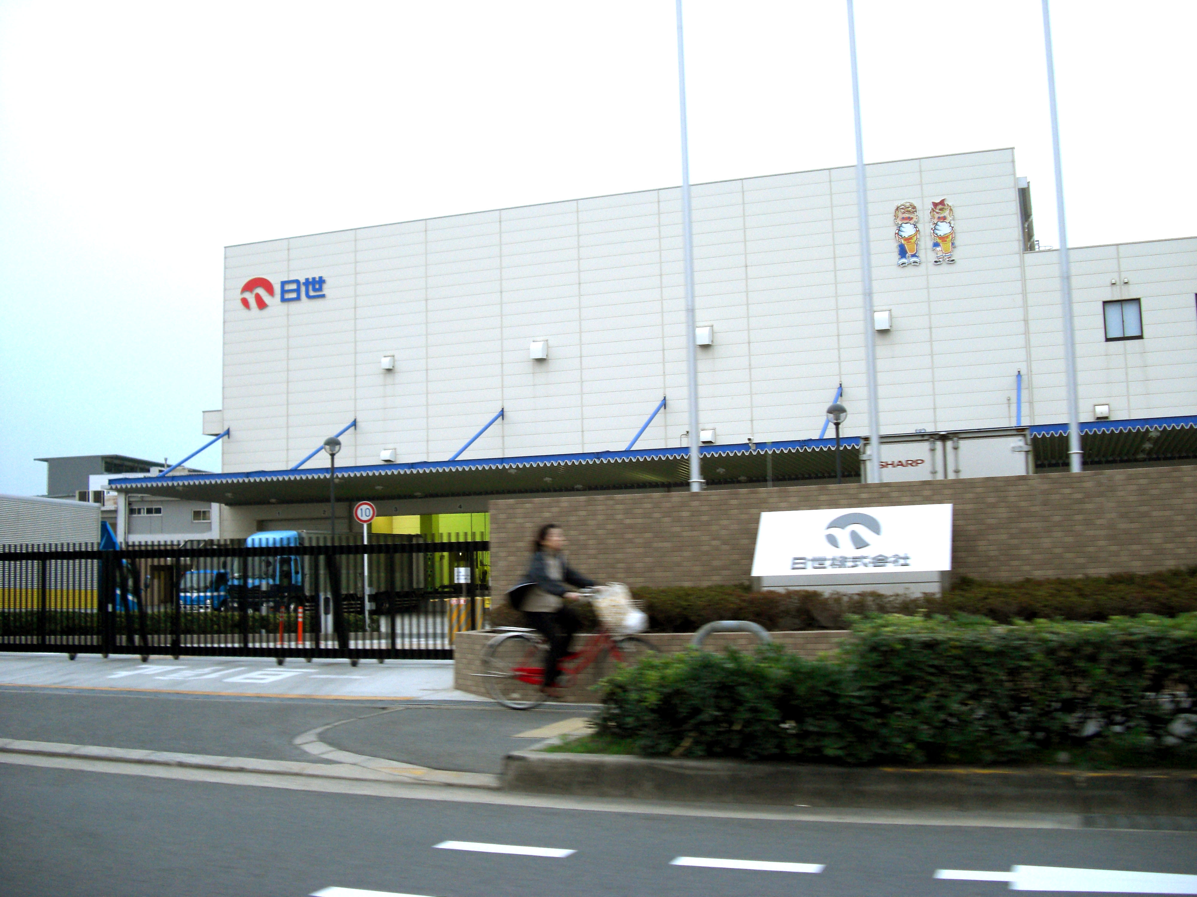 Nissei,Unobe Ibaraki-City Osaka Japan.